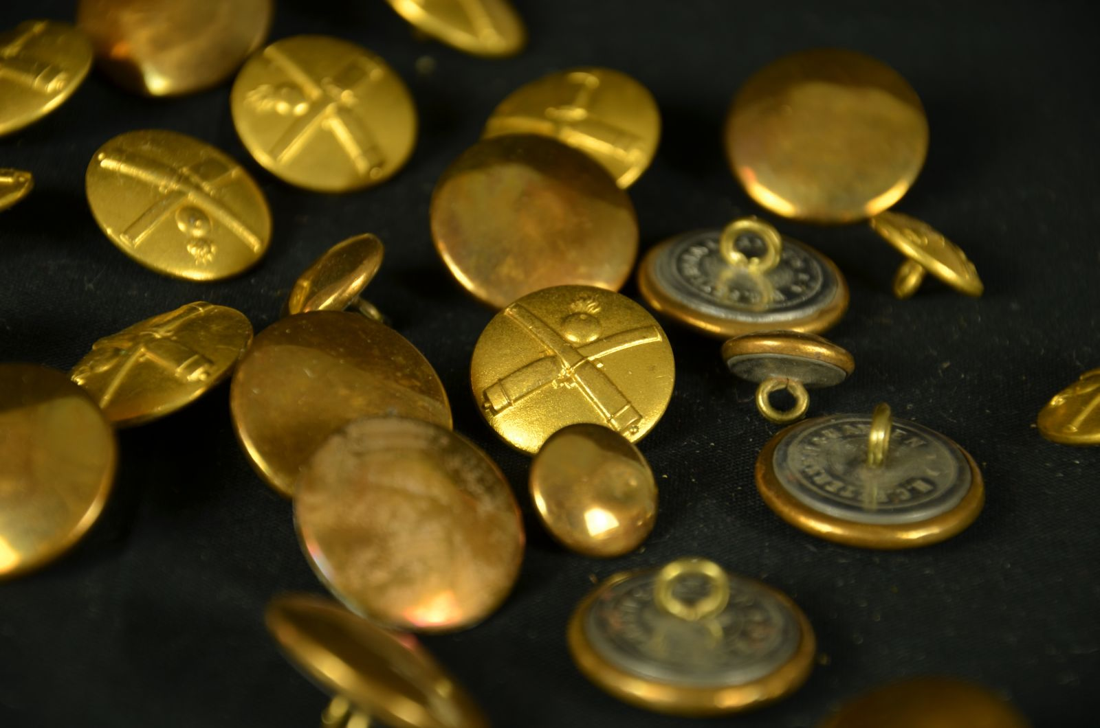 Reserveknapper til uniformen, som Hans bar i sin tid som løjtnant i Lyngbyfortets reservedeling. Nogle af knappernes stempler med de to krydsede kanoner symboliserede, at Hans havde rang af artilleriløjtnant.